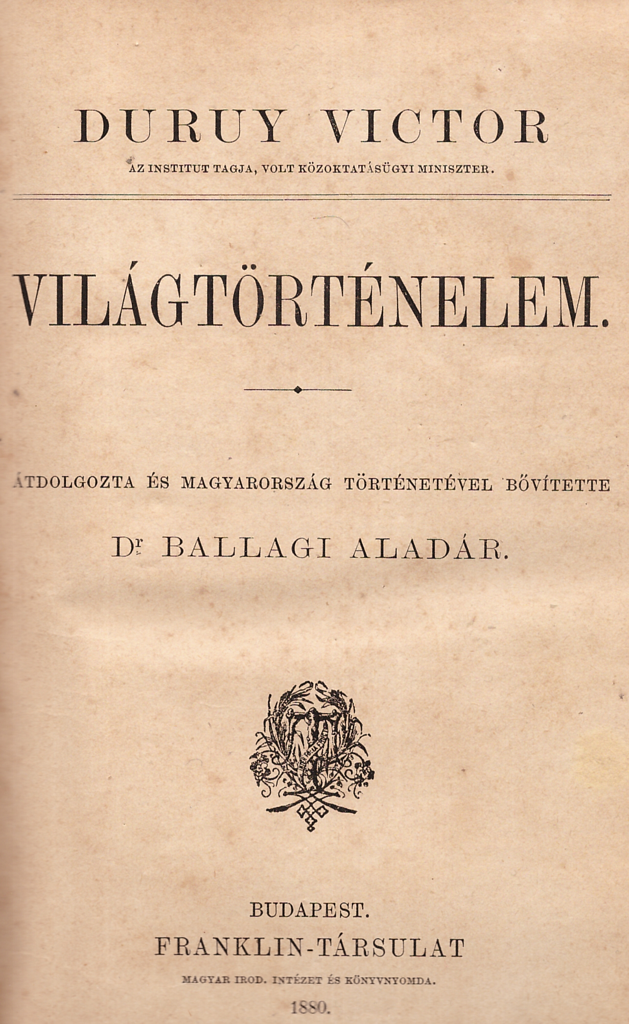 Victor Duruy (1811-1894): Világtörténelem (1880). Átdolgozta és fordította Ballagi Aladár (1853-1928)